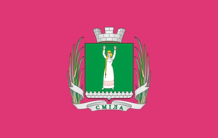 Прапор міста Сміла